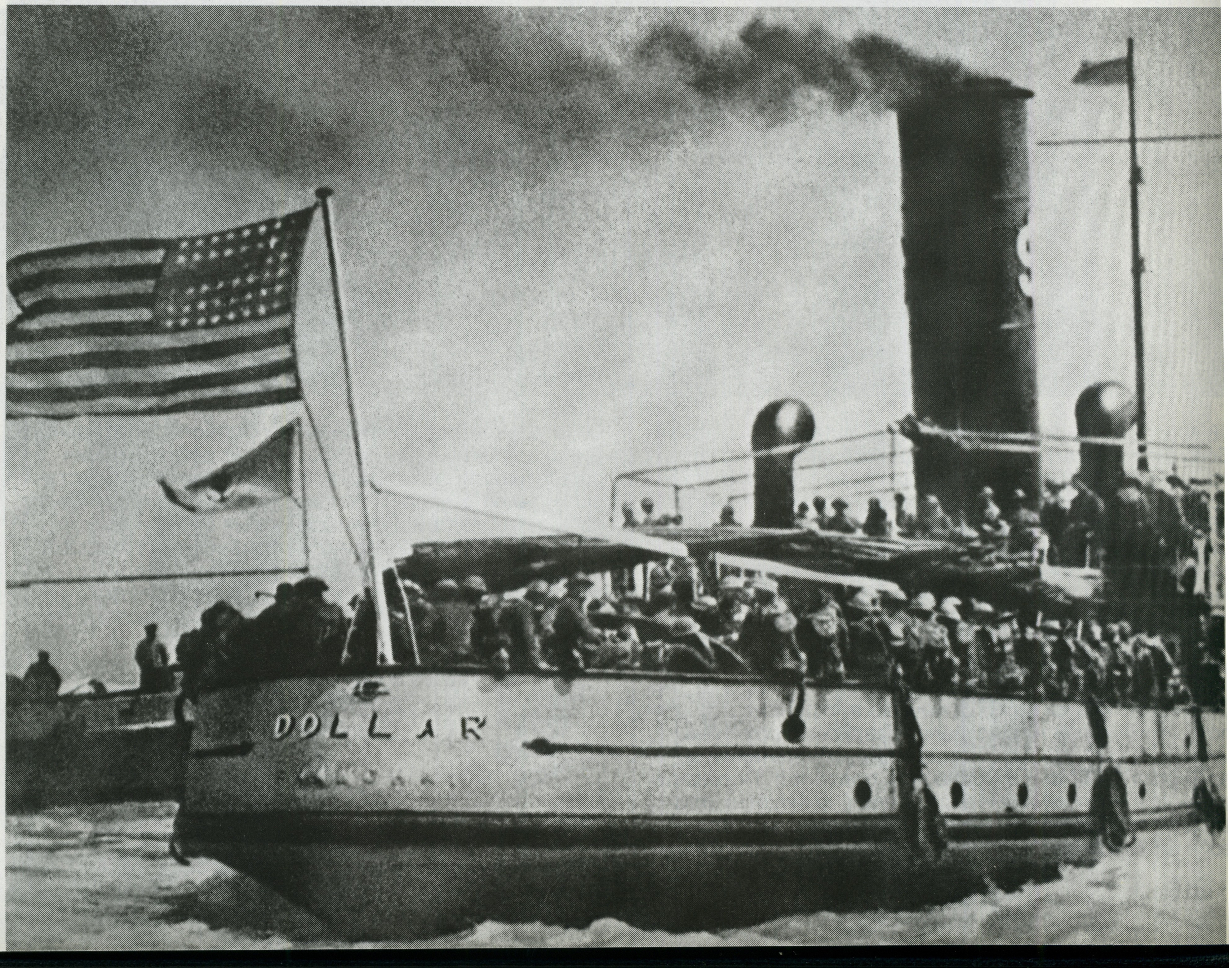 "Американские десантные части движутся на помощь китайским контрреволюционным силам" (подпись под фото). Американская канлодка "Доллар" в Китае. 1927 год.